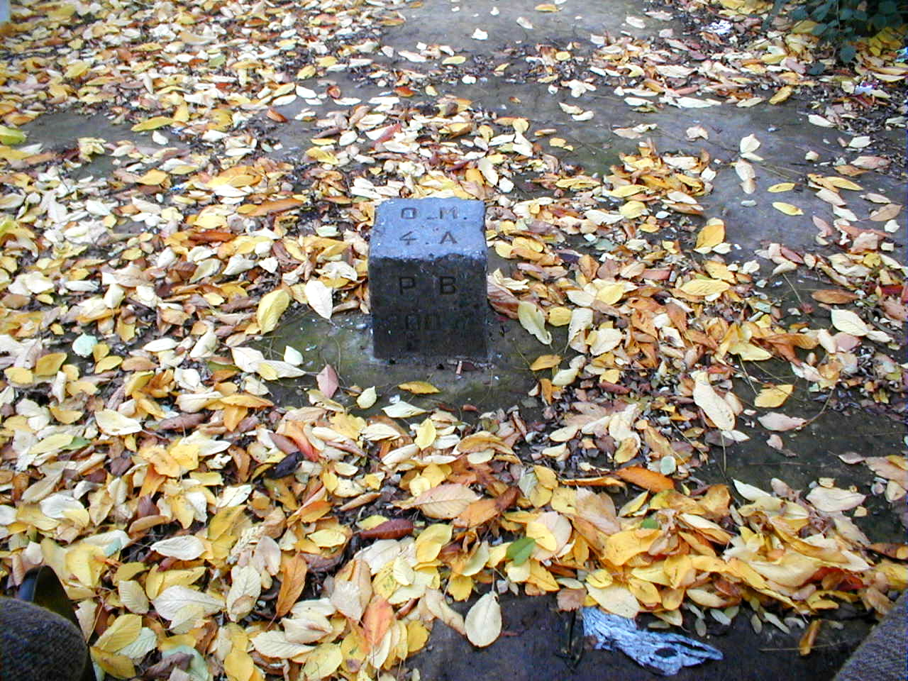 Borne de la fosse de l'Alliance